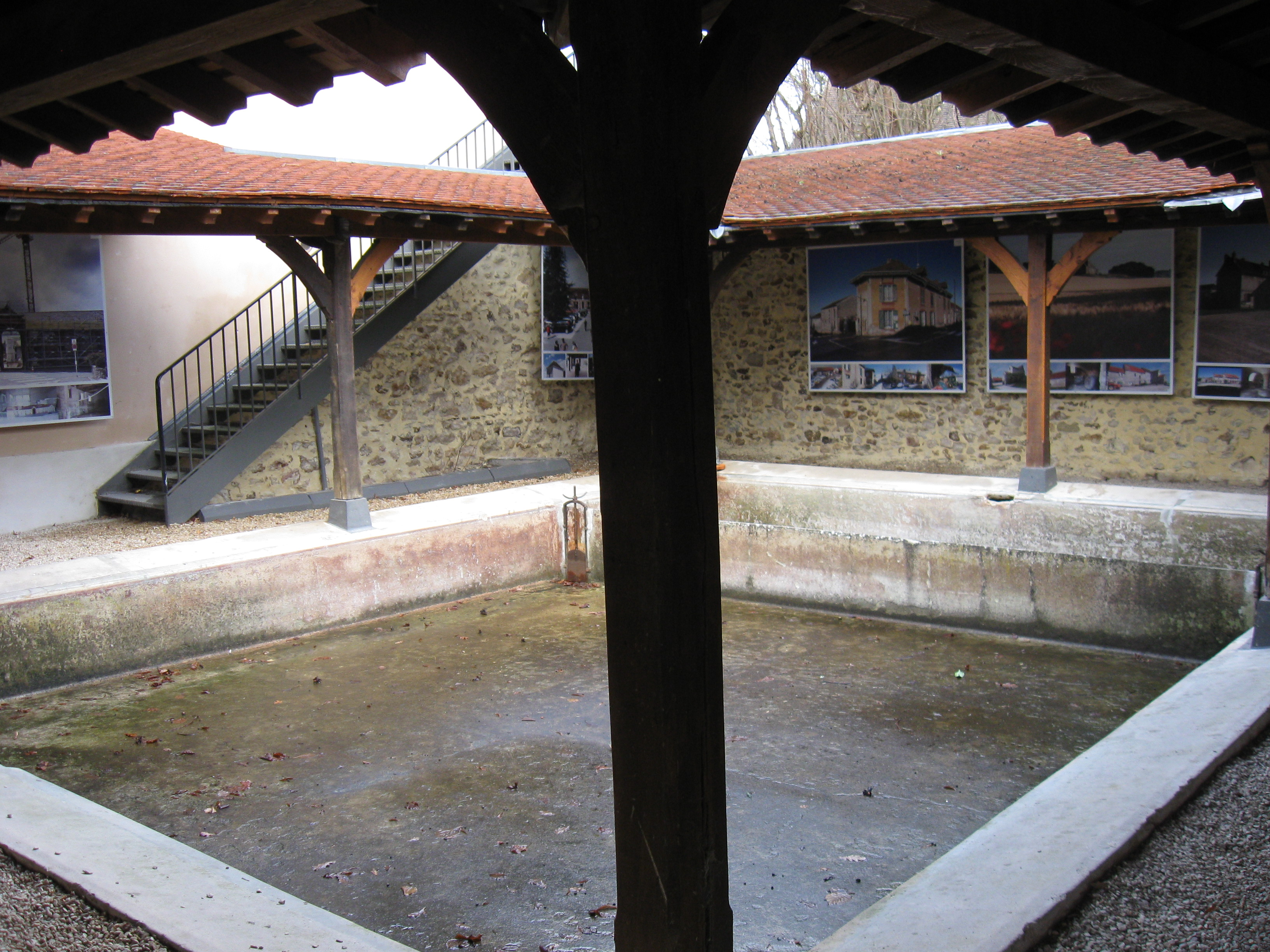 Lavoir communal de Lesches. (Seine-et-Marne, région Île-de-France).